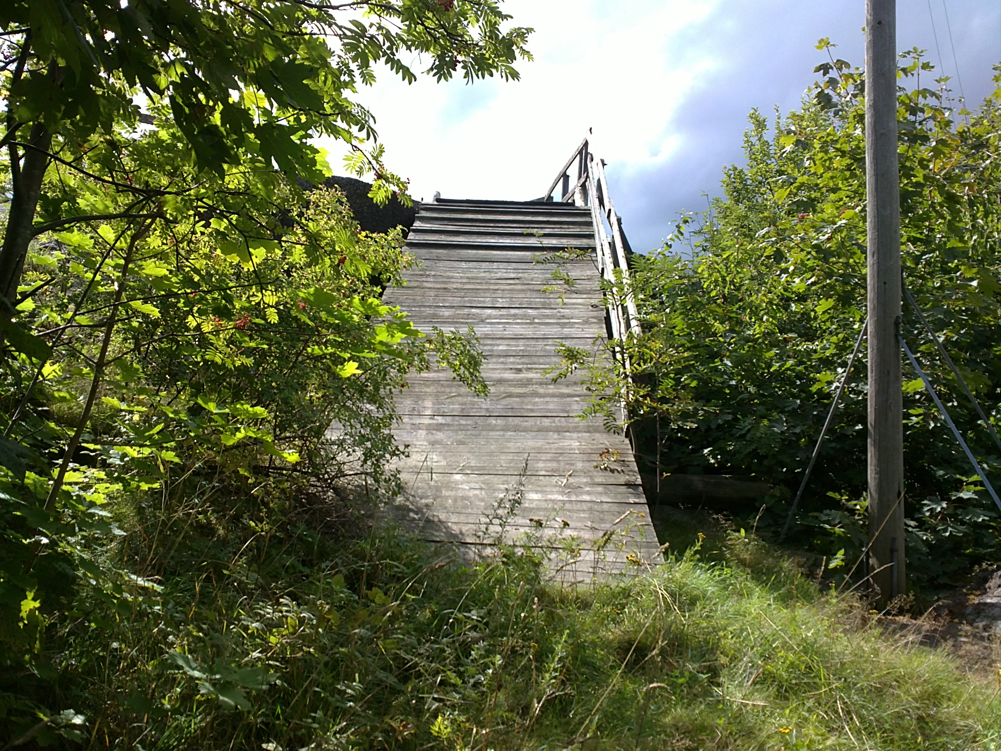 Bilde av nedlagt hoppbakke på Øybyfjellet (Aubyfjellet), Torstrand